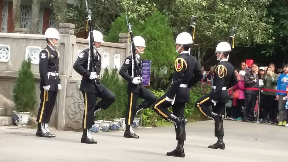 慈湖陵寢，中華民國海軍儀隊禮兵交接。